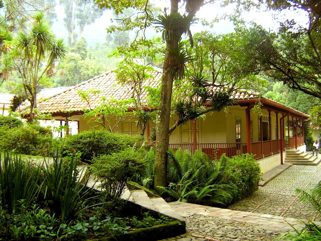 Quinta de Simon Bolivar Bogotá D.C.